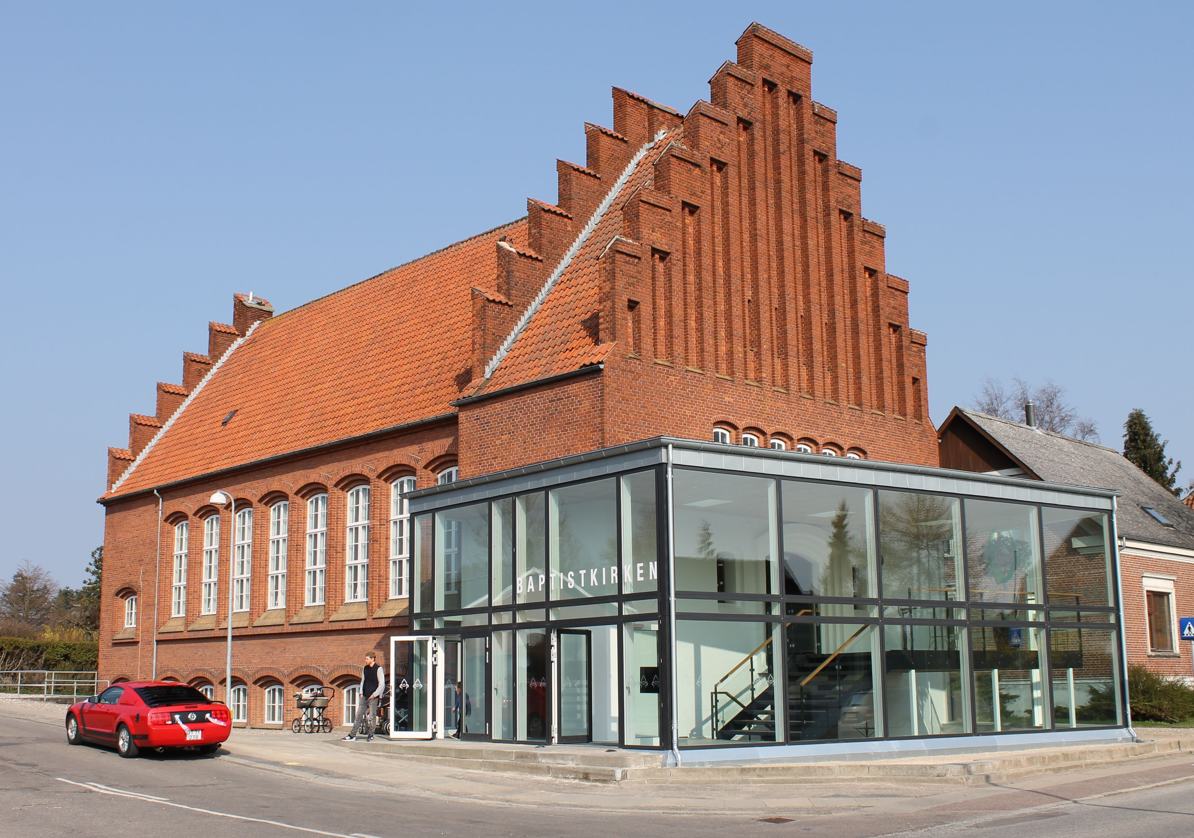 Tølløse Babptistkirken